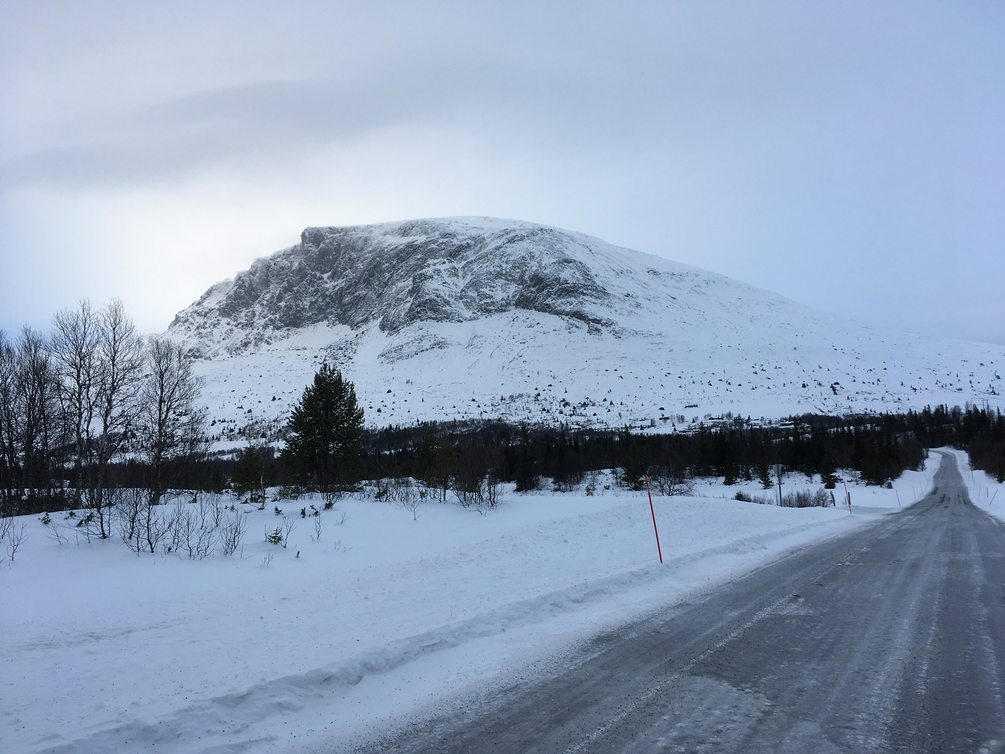 Skogshorn sett fra fylkesvei 231